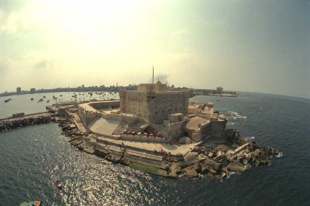 قلعة قايتباي